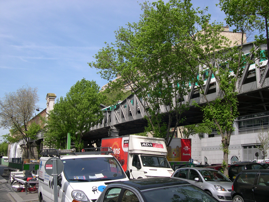 Cambronne metro station